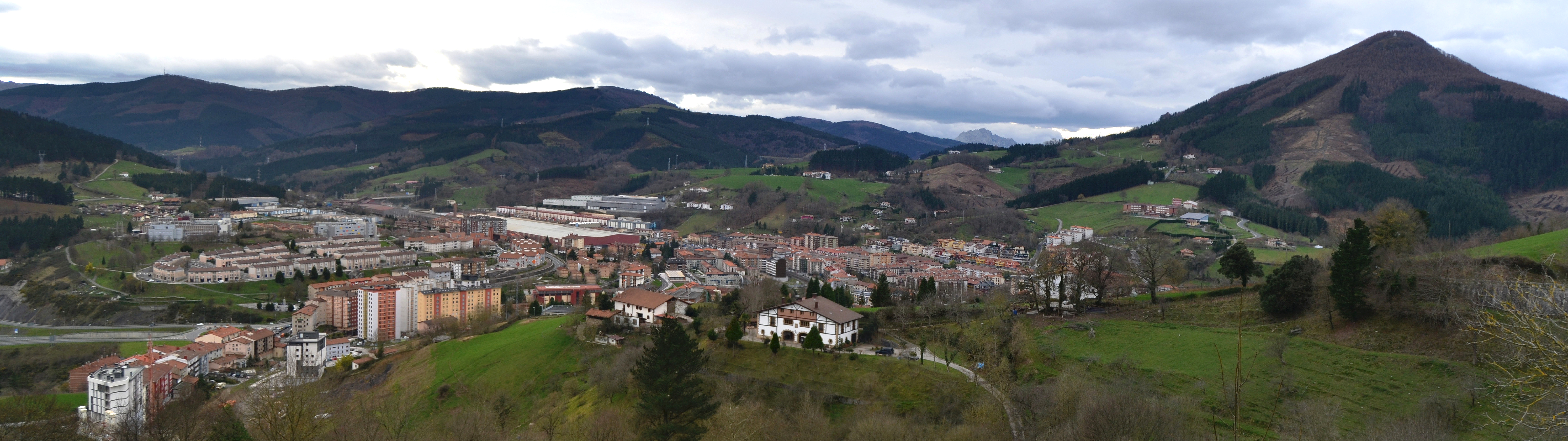 Zumarraga, Gipuzkoa, Euskal Herria